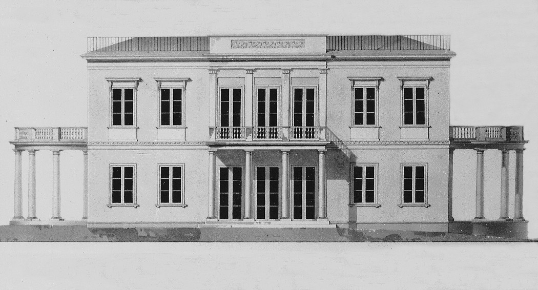 Akvarellerad ritning till Drottningens paviljong (långfasad)